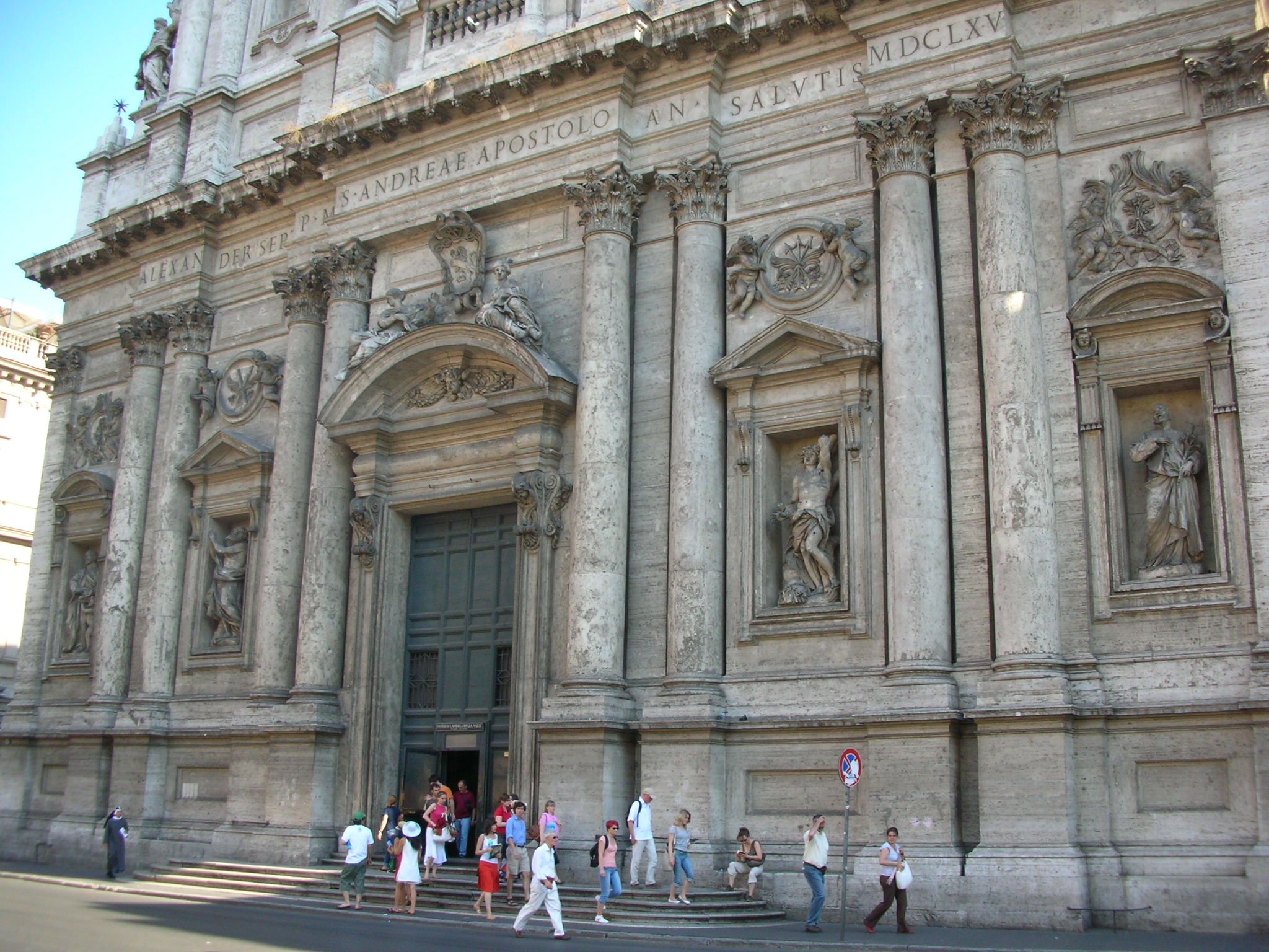 Façade, Sant'Andrea della Valle, Rome